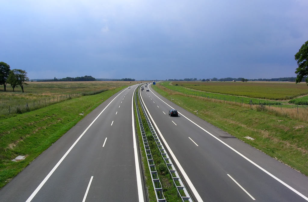 Autobahn A 20 bei Langsdorf – Blickrichtung Rostock